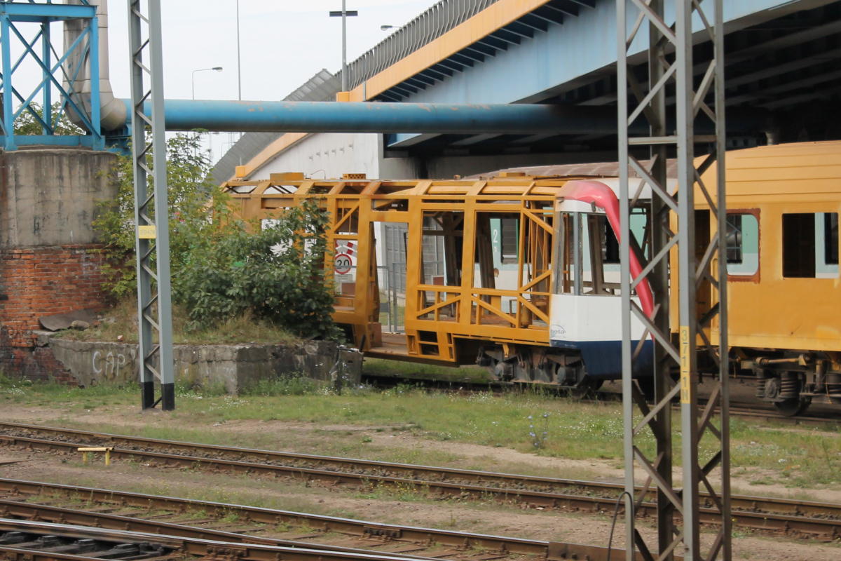 Pudła elektrycznego zespołu trakcyjnego EN95-01 na terenie bocznicy zakładu Pesa Bydgoszcz. This photo was taken during Railway Wikiexpedition 2014 set up by Wikimedia Polska Association in cooperation with Fundacja Grupy PKP. You can see all photographs in category Wikiekspedycja kolejowa 2014.